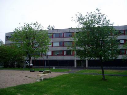 Kerrostalo Turun Suikkilassa.